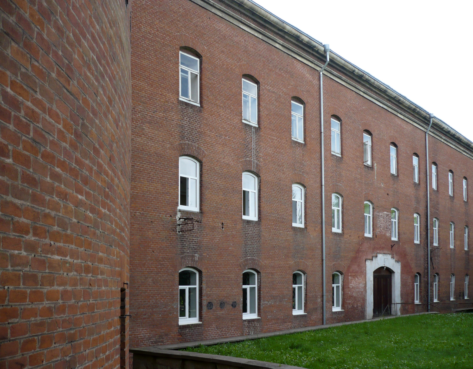 Lwów - cytadela